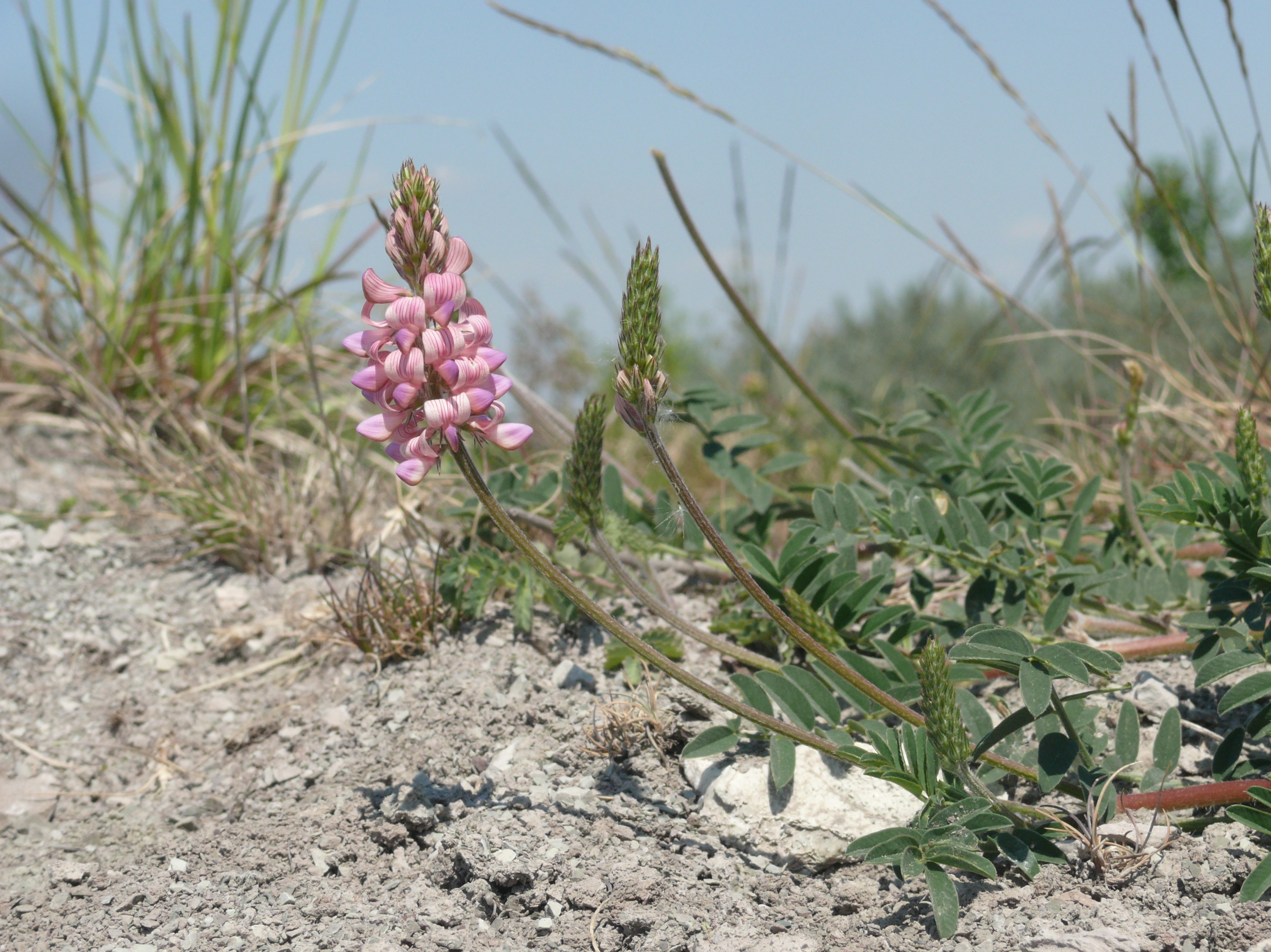 Onobrychis arenaria subsp. arenaria, Hohenlohe, Deutschland